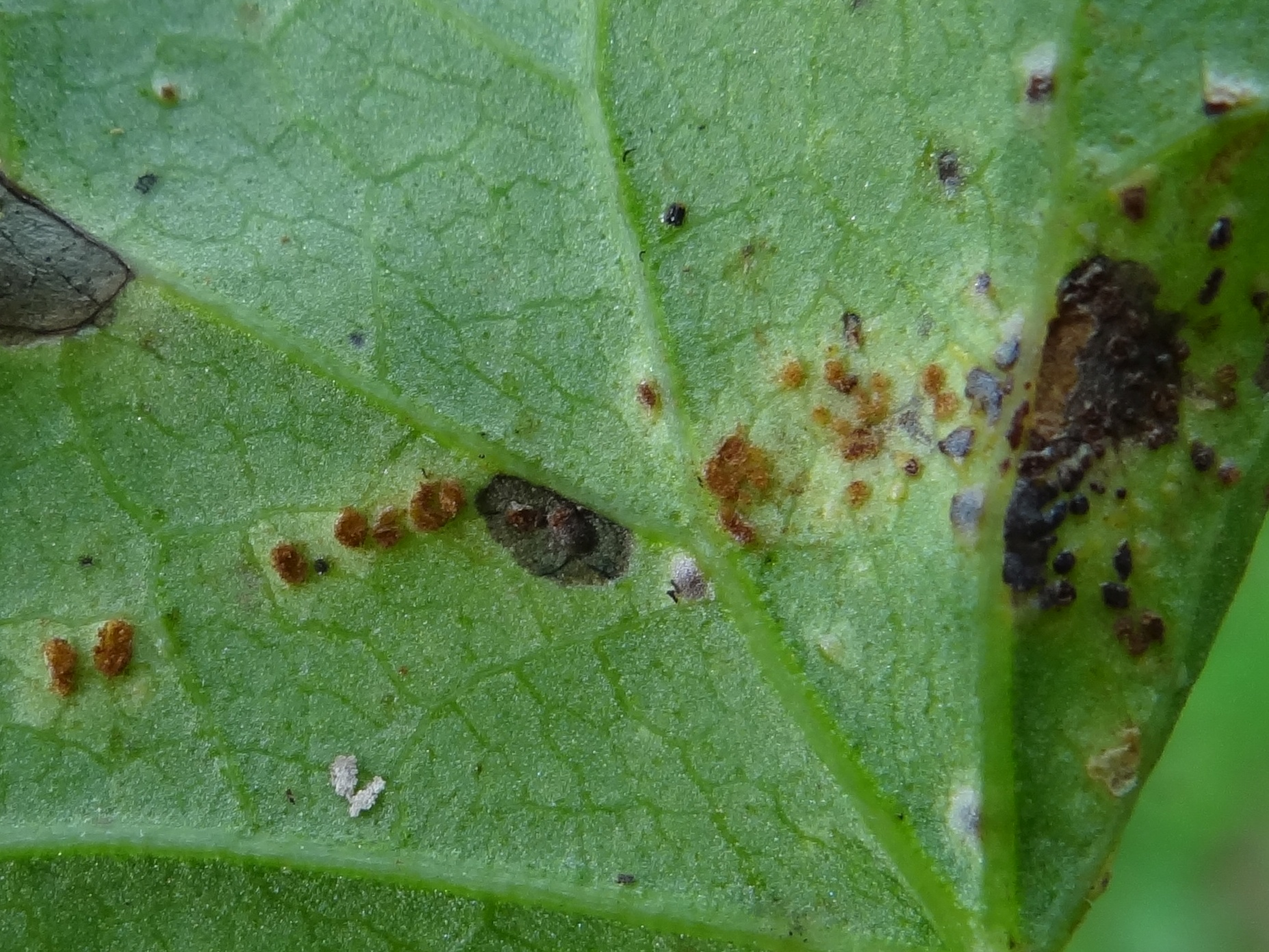 Puccinia convolvuli (uredium and telium) on Calystegia sepium